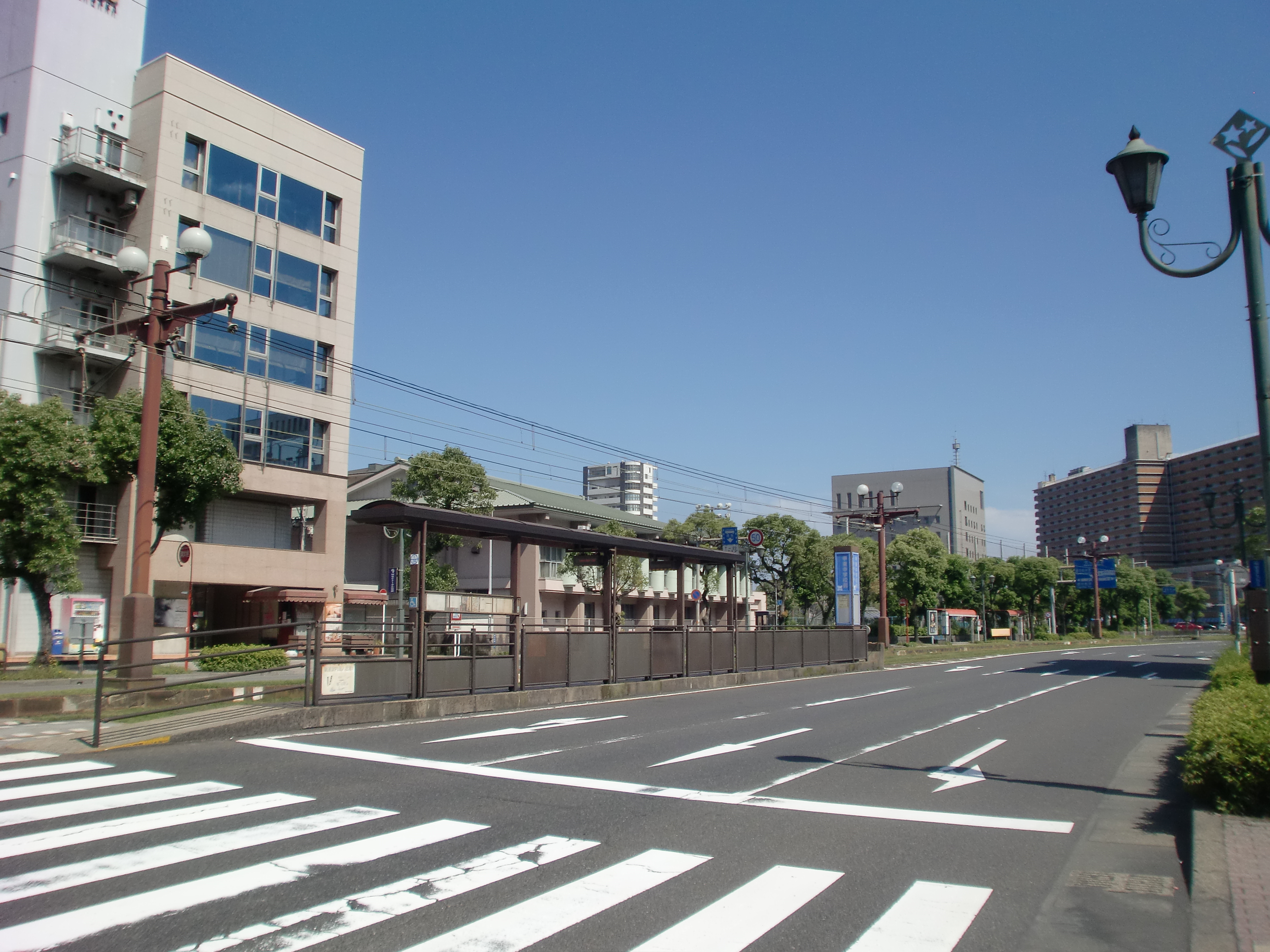 甲東中学校前停留場（鹿児島駅方面のりば）の画像。停留場名の由来となった鹿児島市立甲東中学校が画像の背後に見える。